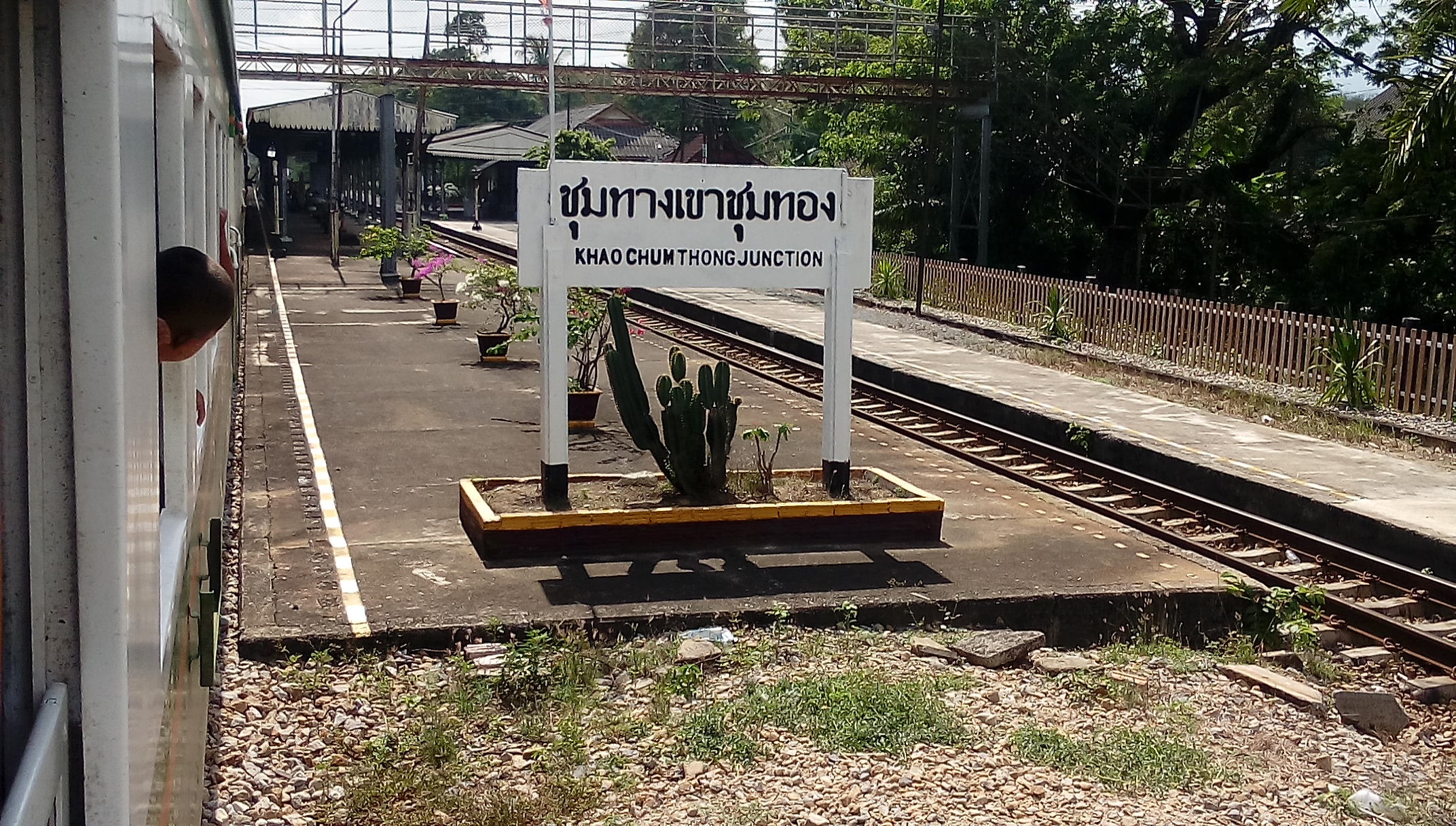 ชุมทางเขาชุมทอง